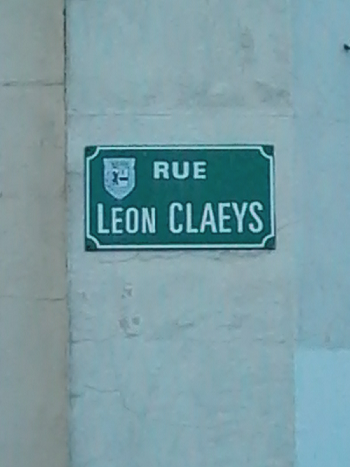 Plaque de rue Léon Claeys à Bergues